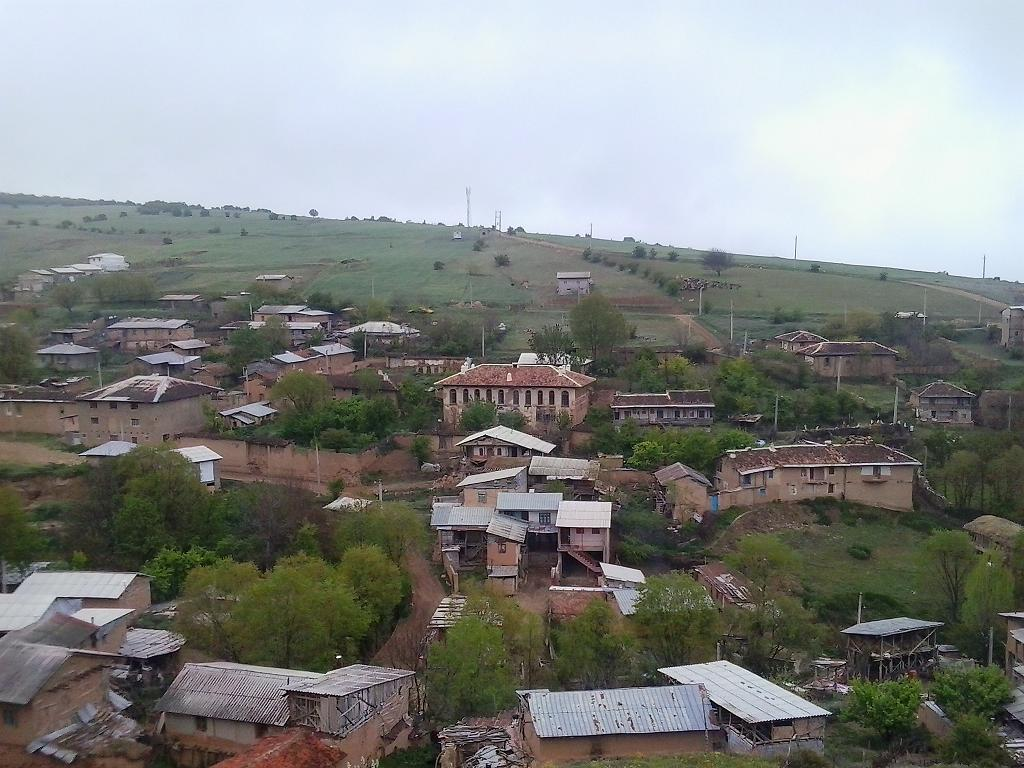 چشم انداز روستای یانه سر از بالای تاور و بلندیهای ضلع شمالی